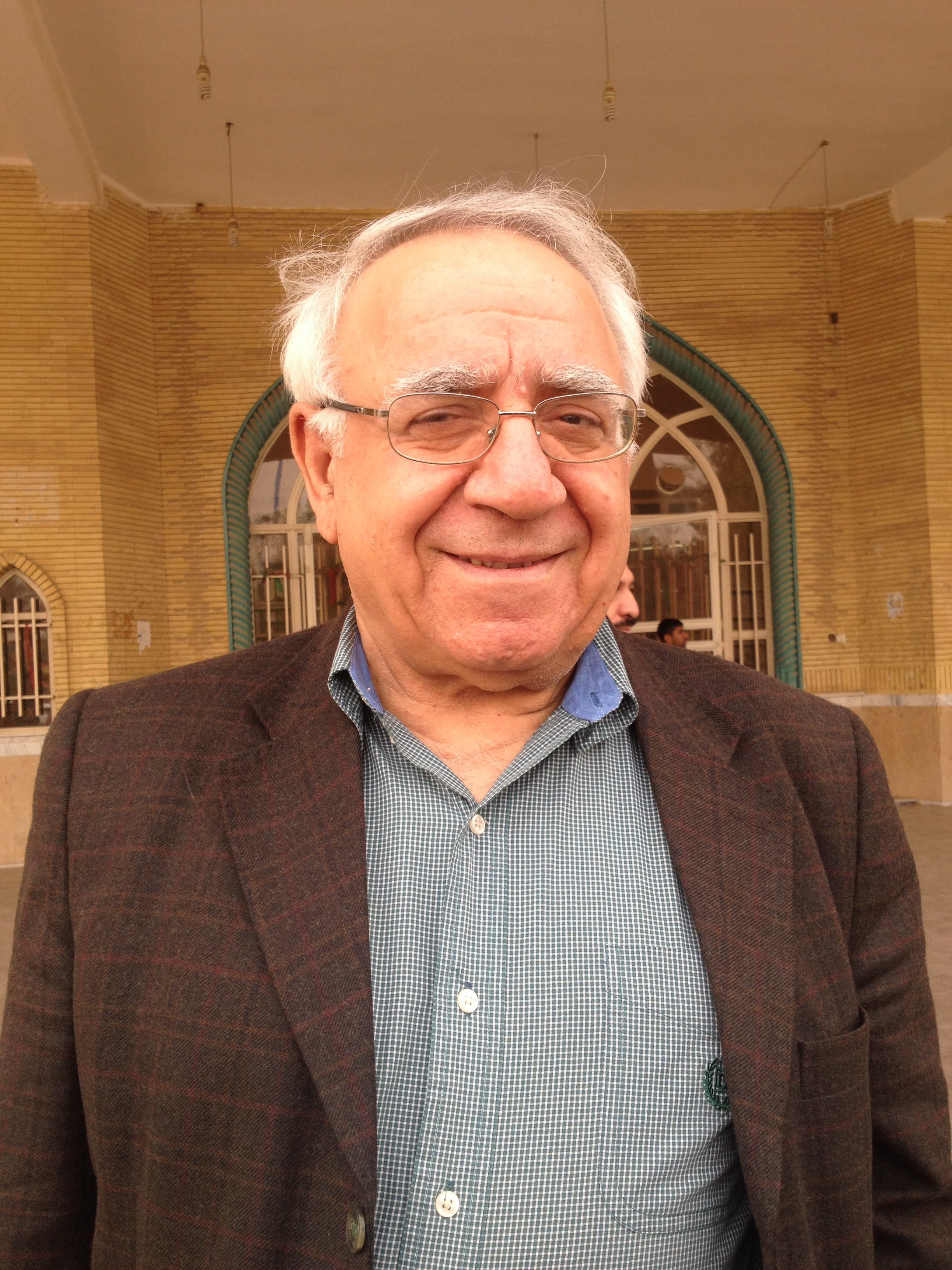 امیدعلی شهنی کرم‌زاده